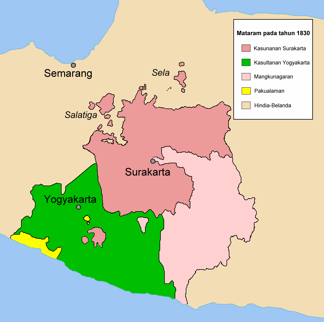 Peta Mataram Baru setelah Perang Diponegoro pada tahun 1830. Peta ini digambar oleh Meursault2004 alias Revo Arka Giri S. berdasarkan Robert Cribb, 2000, Historical Atlas of Indonesia halaman 114. Licensing Kategori:Gambar peta